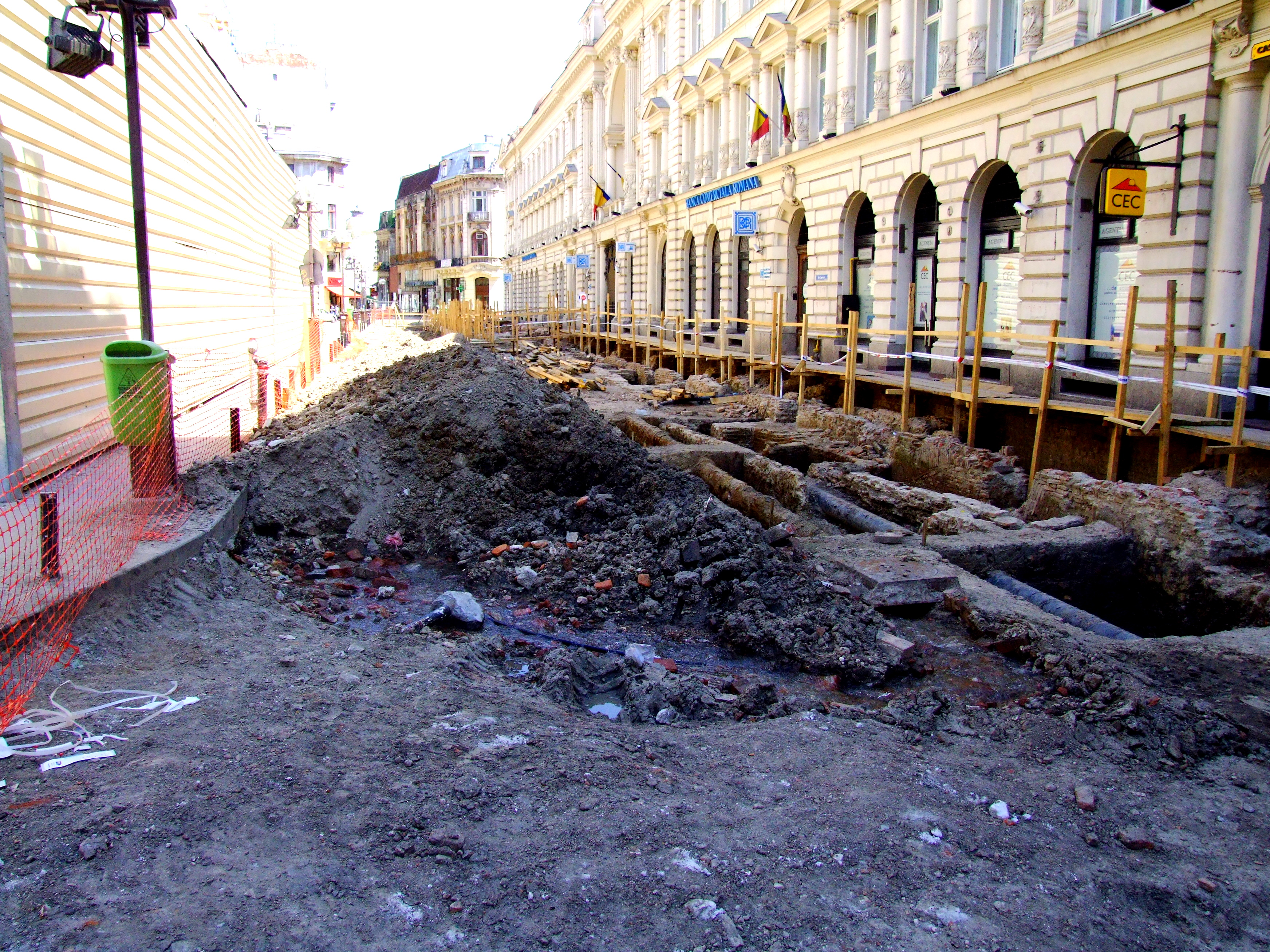 Palatul fostei Societăți de asigurări Dacia - România B-II-m-A-19021